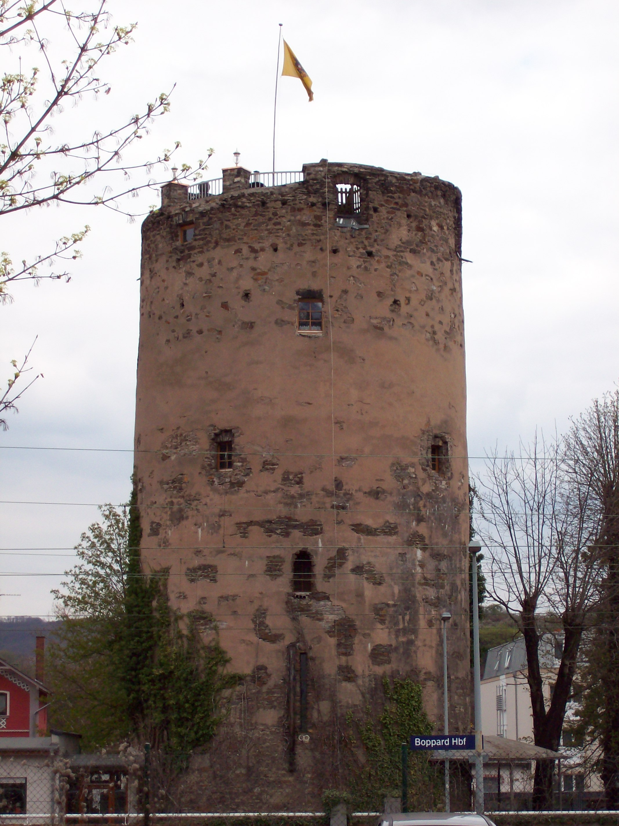 Der Säuerlingsturm gehört zur ehemaligen Stadtbefestigung von Boppard.